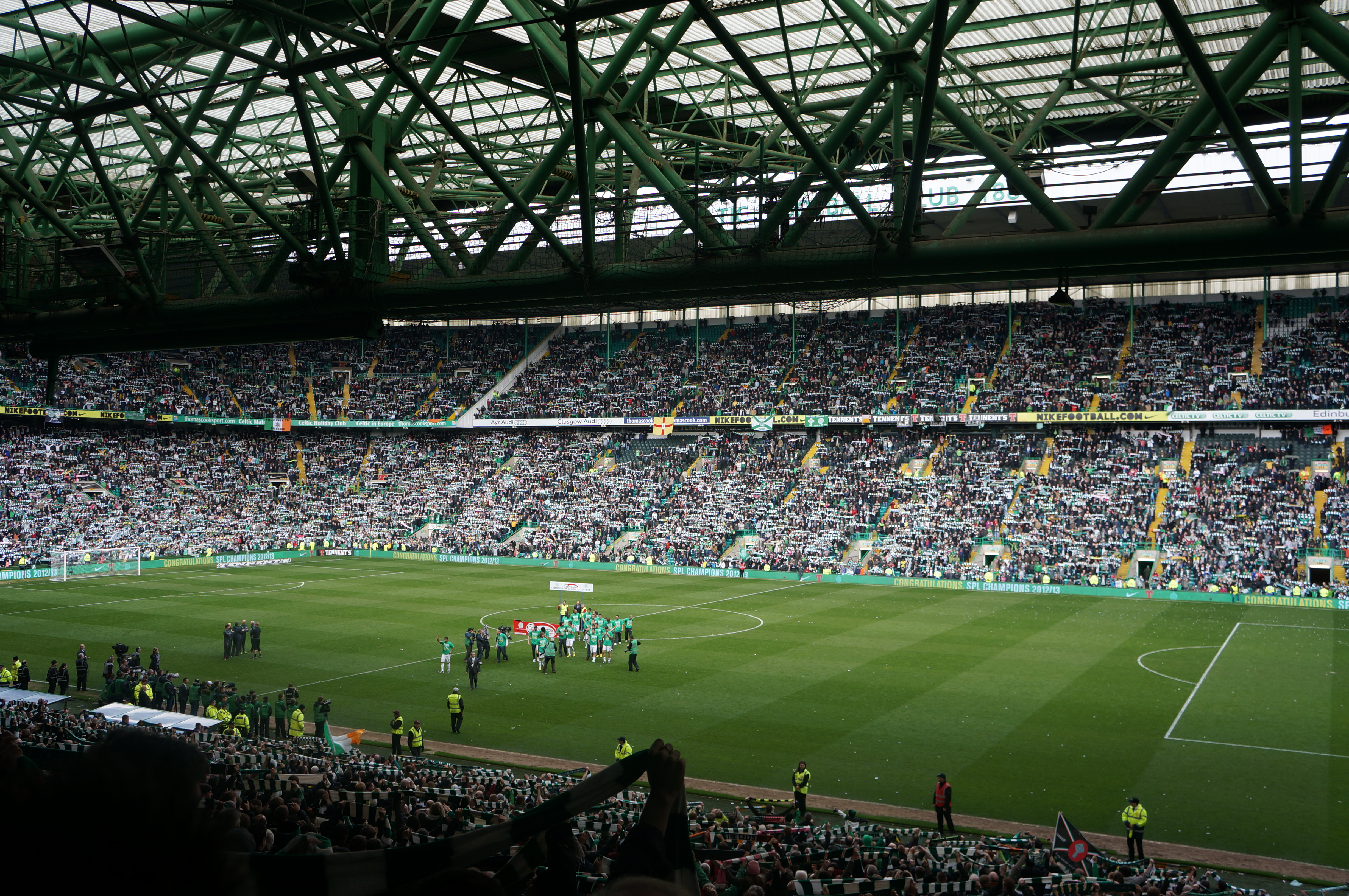 凯尔特人加冕2012/2013赛季苏超冠军